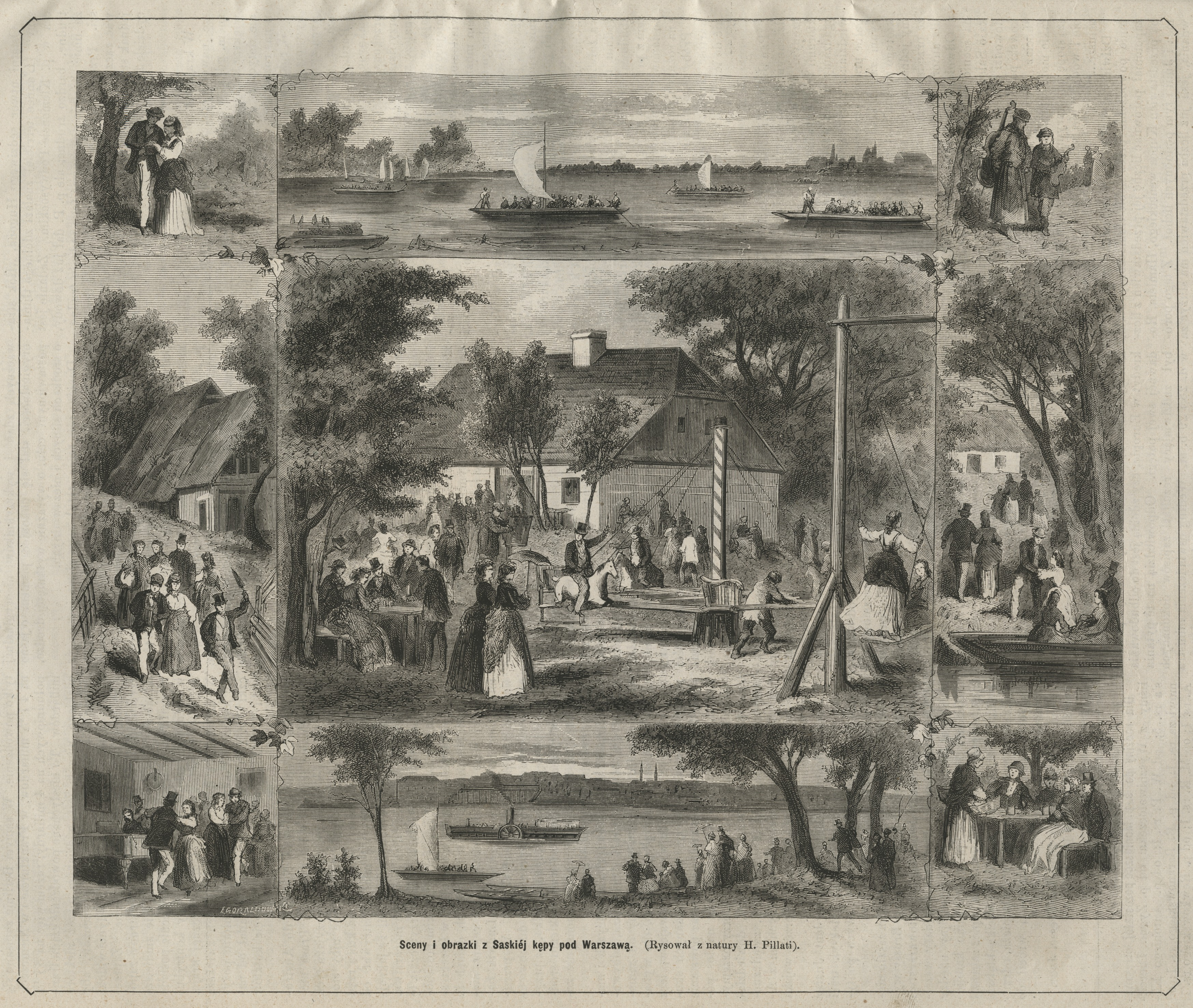 Sceny i obrazki z Saskiej Kępy pod Warszawą : (Rysował z natury H. Pillati)